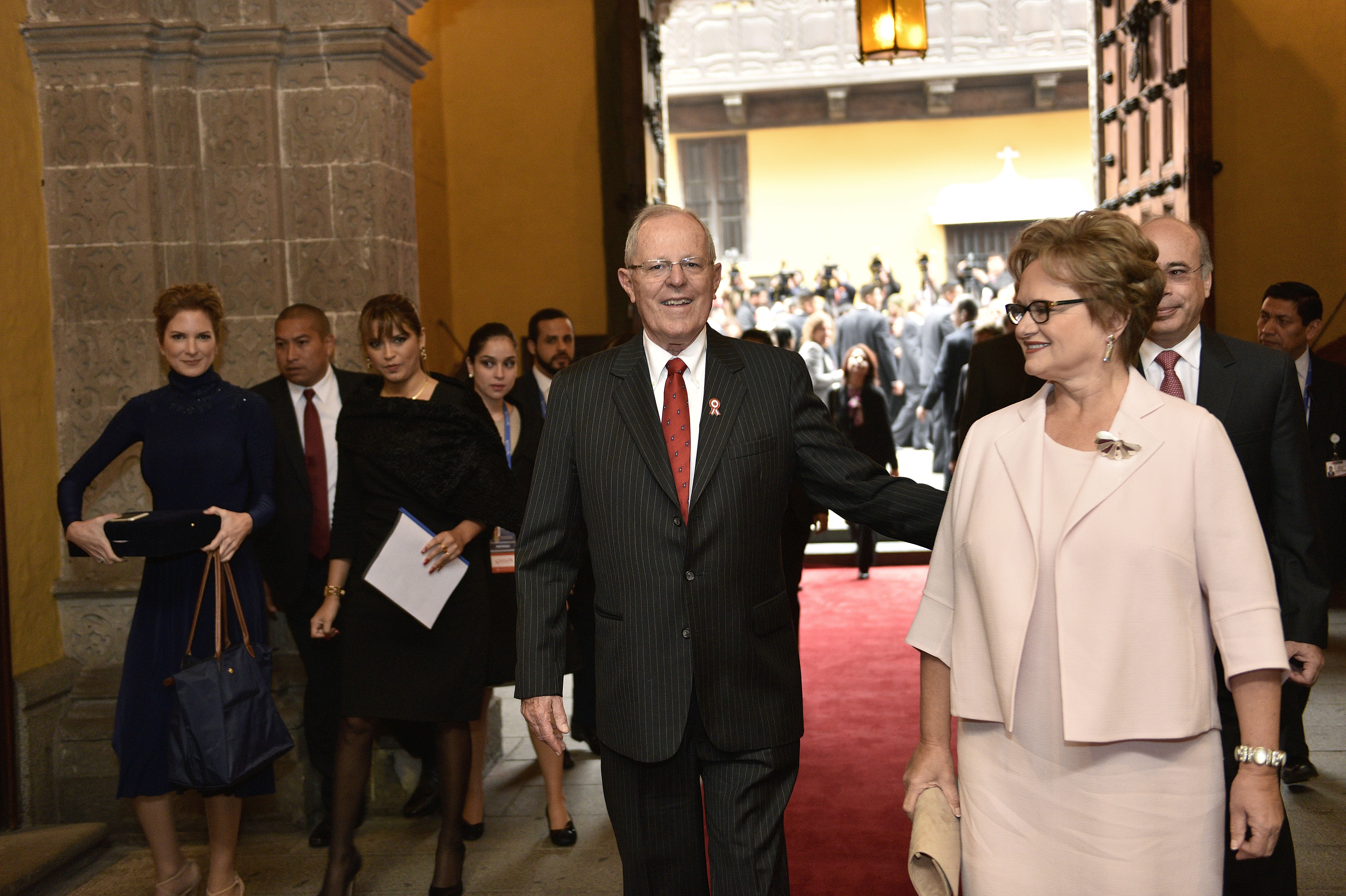 Pedro Pablo Kuczynski a su llegada a Palacio de Torre Tagle